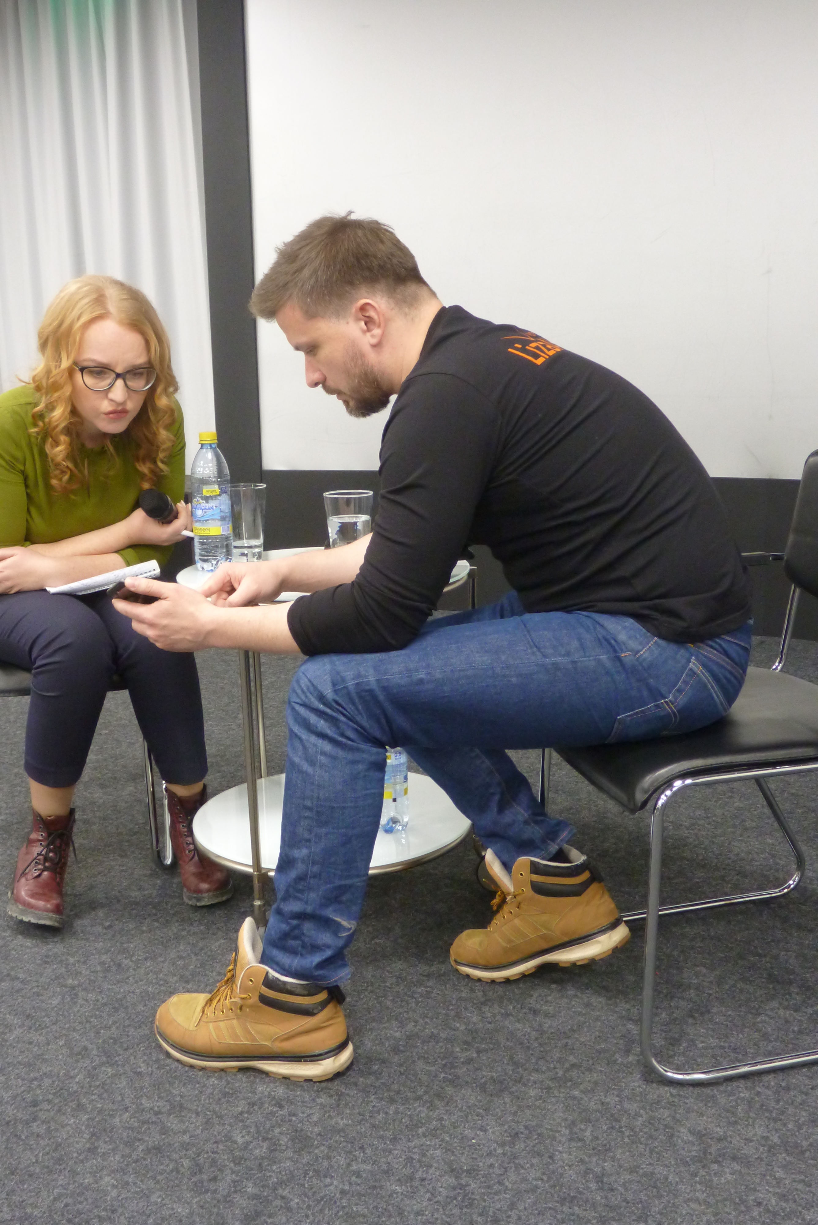 Григорий Борисович Сергеев 17 декабря 2018 года